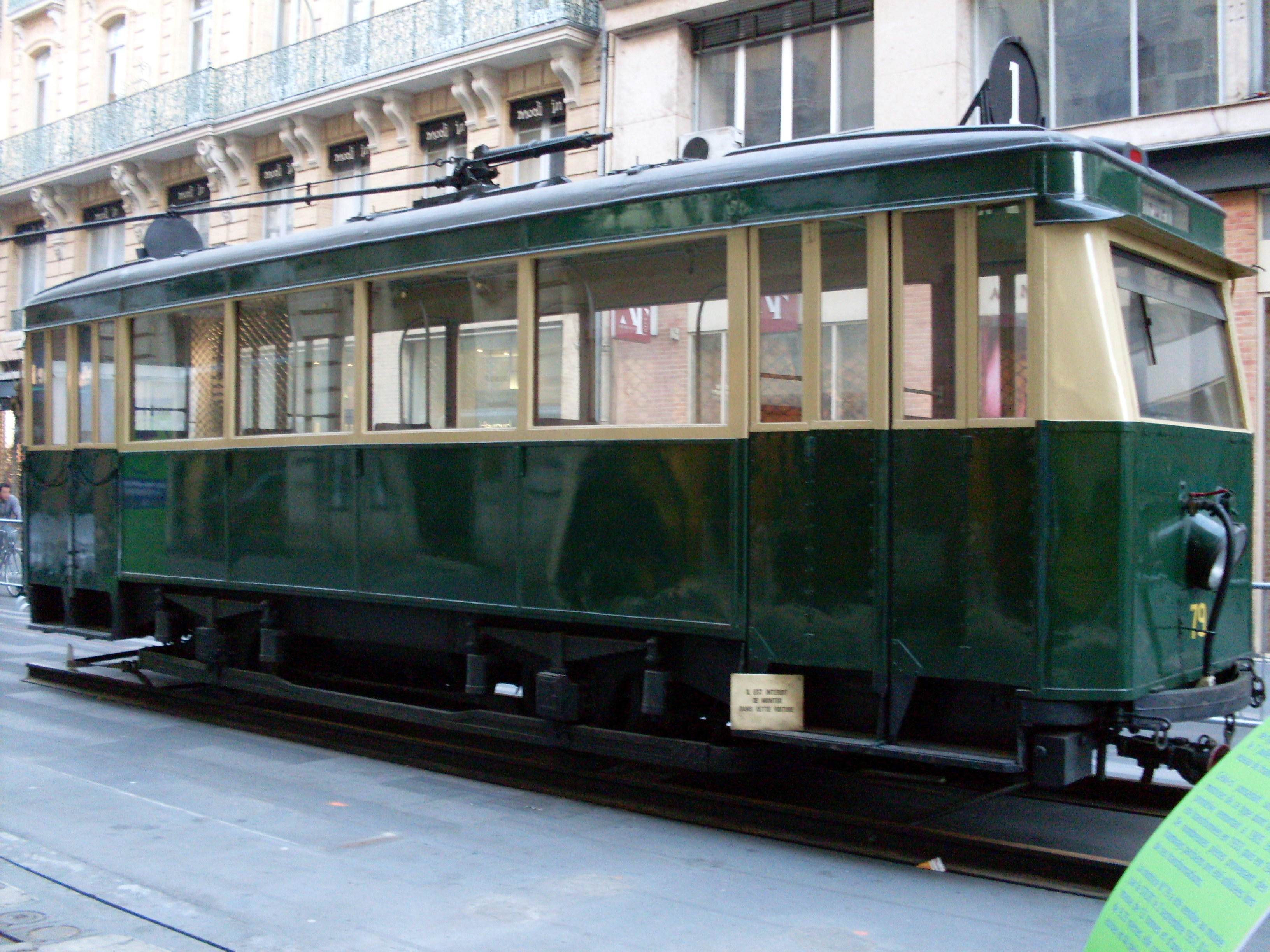 Tram : motrice no 79 type K2, 12 tonnes, longueur 9,25 m, 16 places assises, 44 debout. Tram de Toulouse en utilisation entre 1947 et 1957.